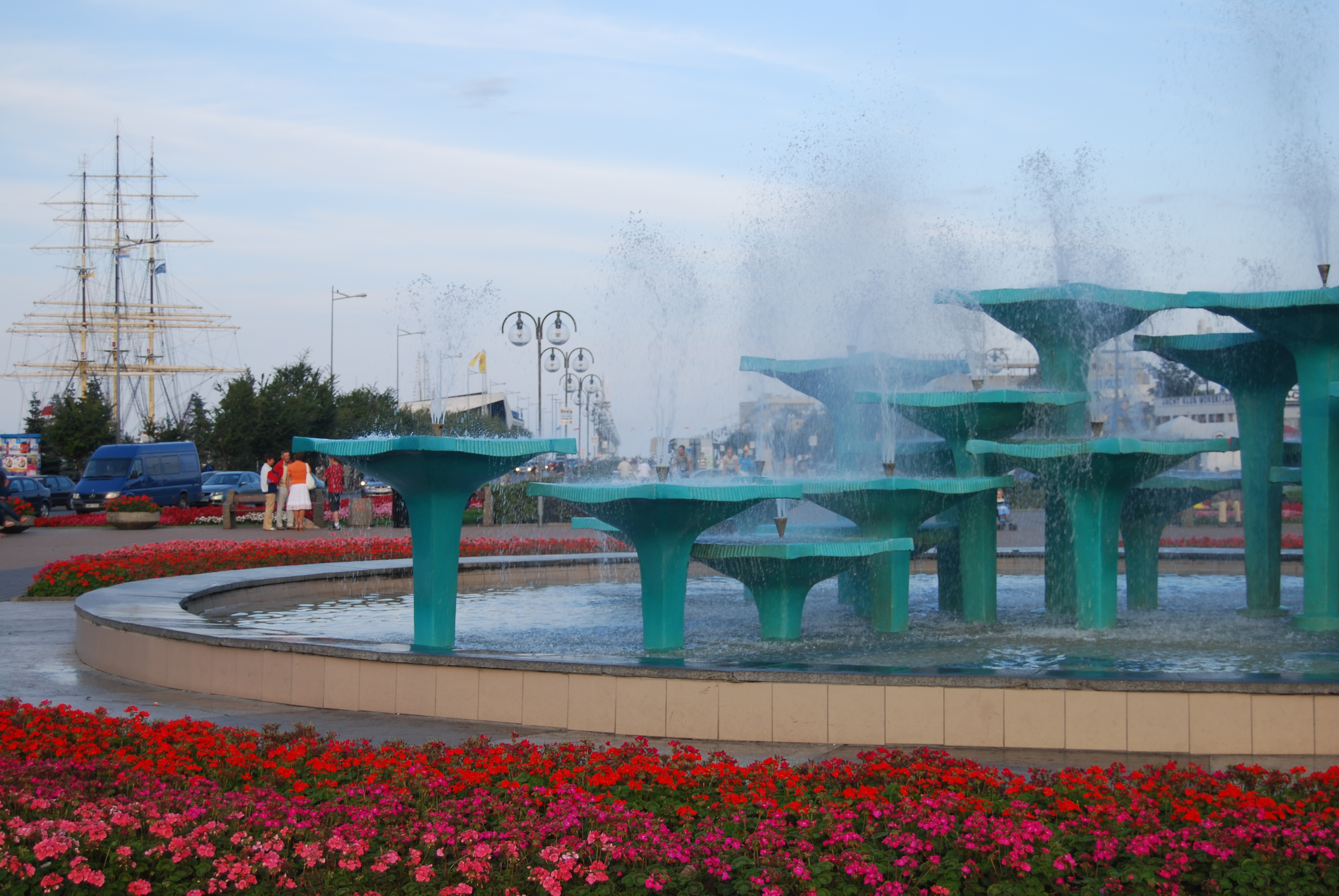 Gdynia fountain